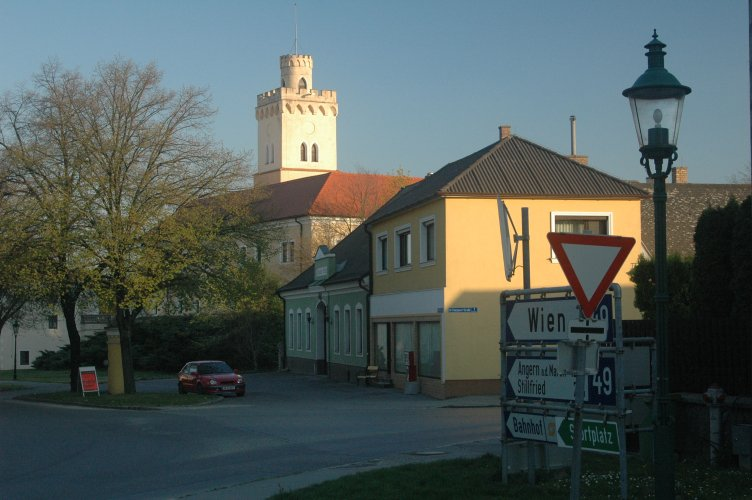 Dürnkrut, Castle